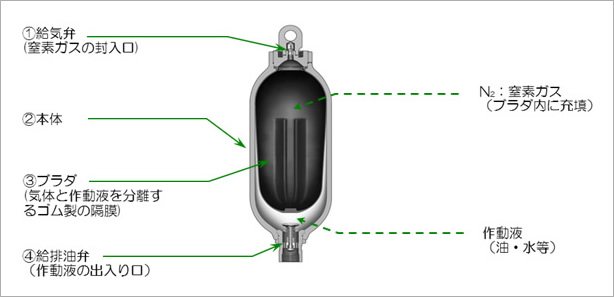 アキュムレータの概要